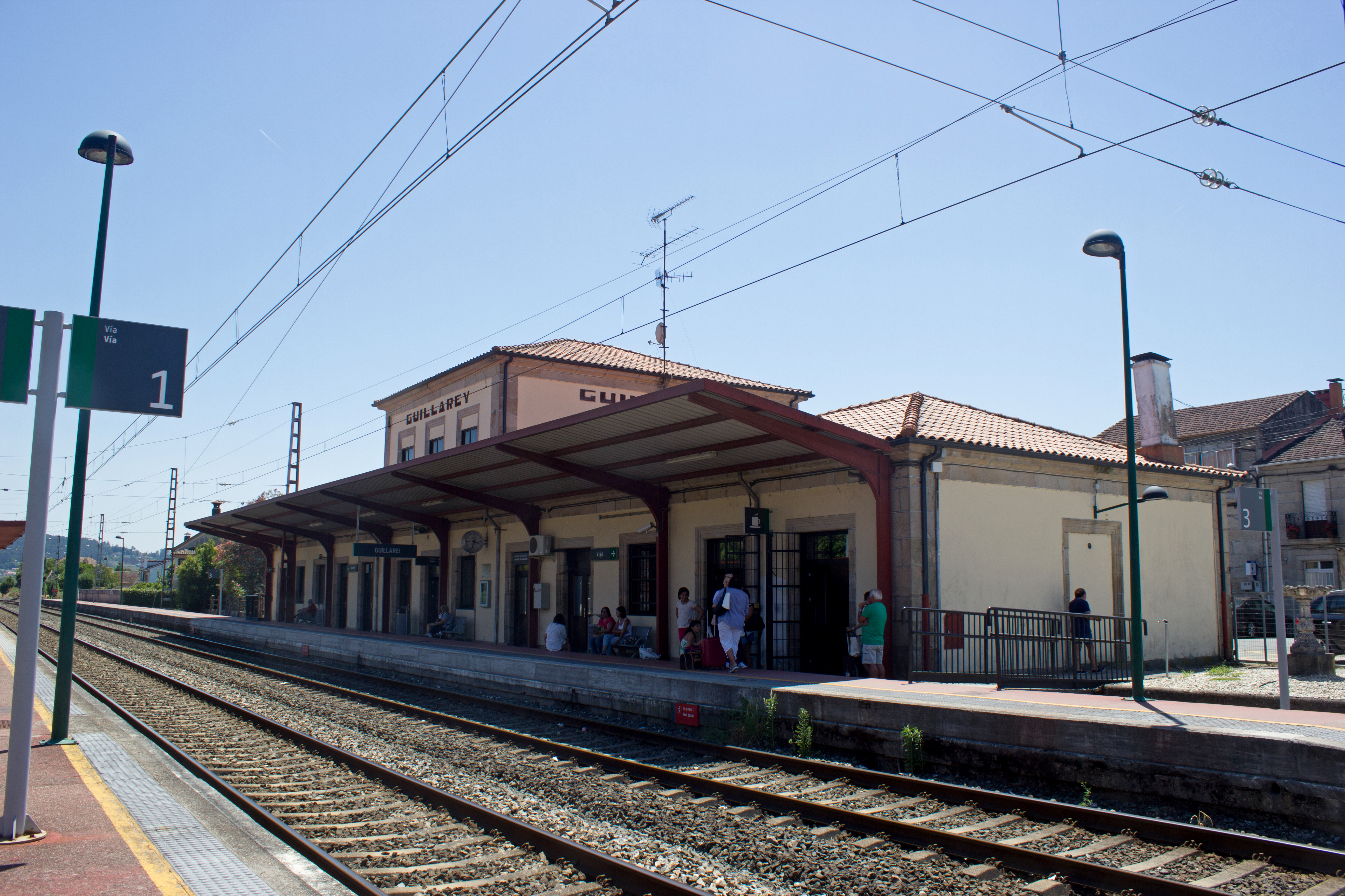 Estación de tren de Guillarei,Tui.